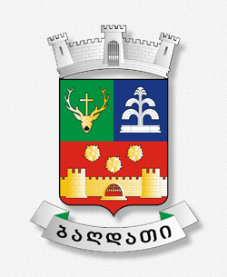 ბაღდადის მუნიციპალიტეტის გერბი